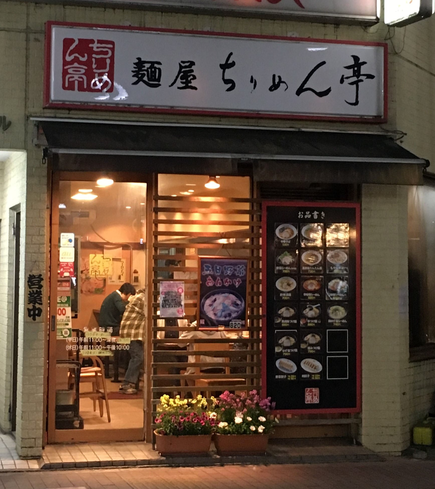 ちりめん亭 金町店